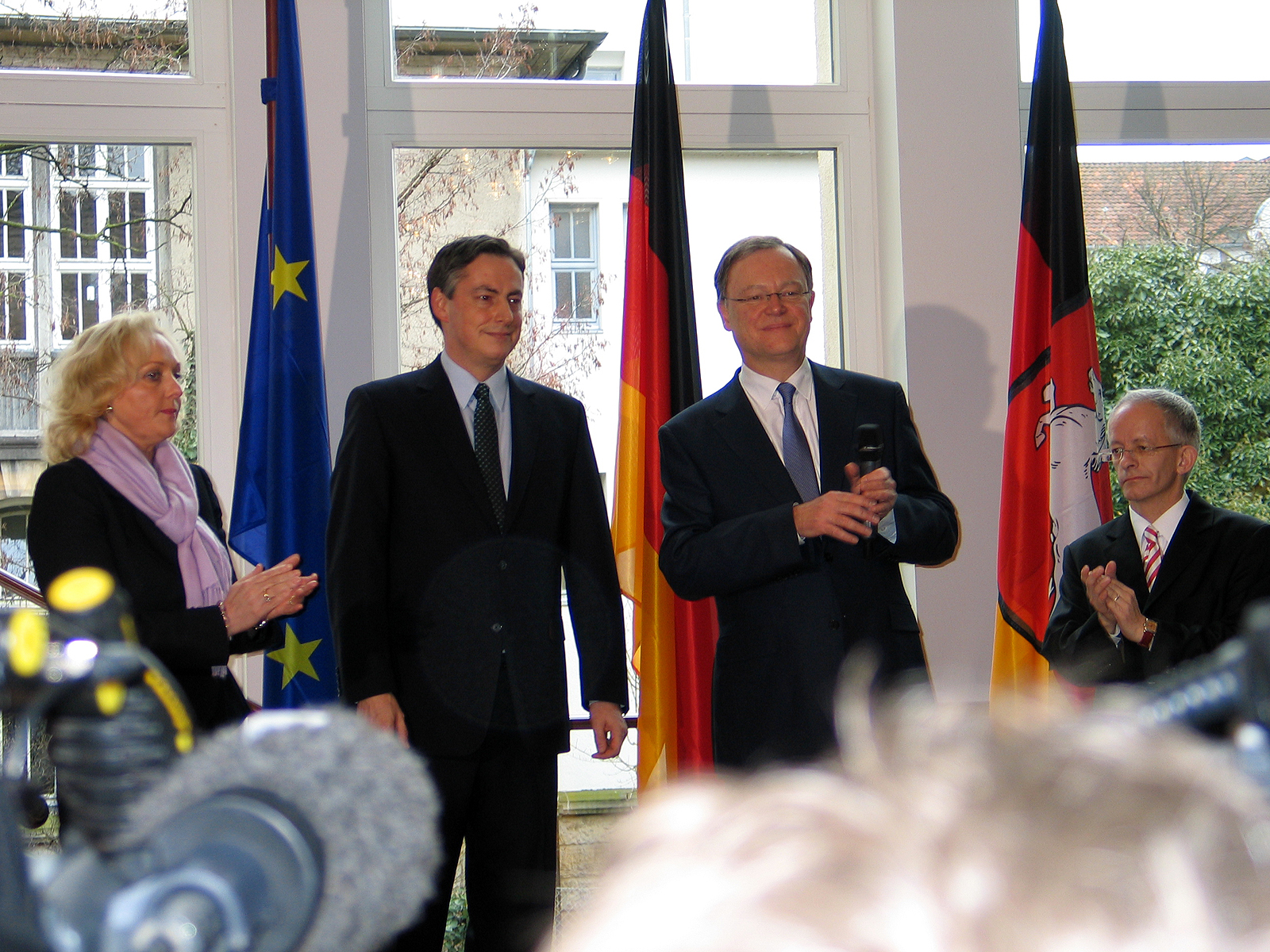 Nach der Wahl von Stephan Weil zum neuen niedersächsischen Ministerpräsidenten wurden in der Niedersächsischen Staatskanzlei die Amtsgeschäfte übergeben; von links: Christine Hawighorst und David McAllister, rechts daneben Stephan Weil und der neue Chef der Staatskanzlei, Jörg Mielke ...